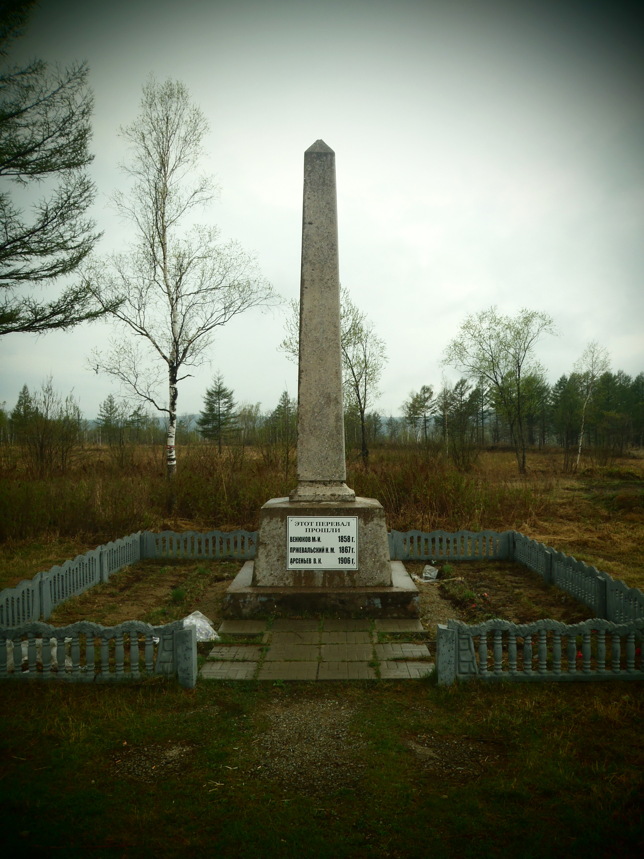 Перевал Венюкова, Кавалеровский район This image is related to the protected area of Russia number 2510079